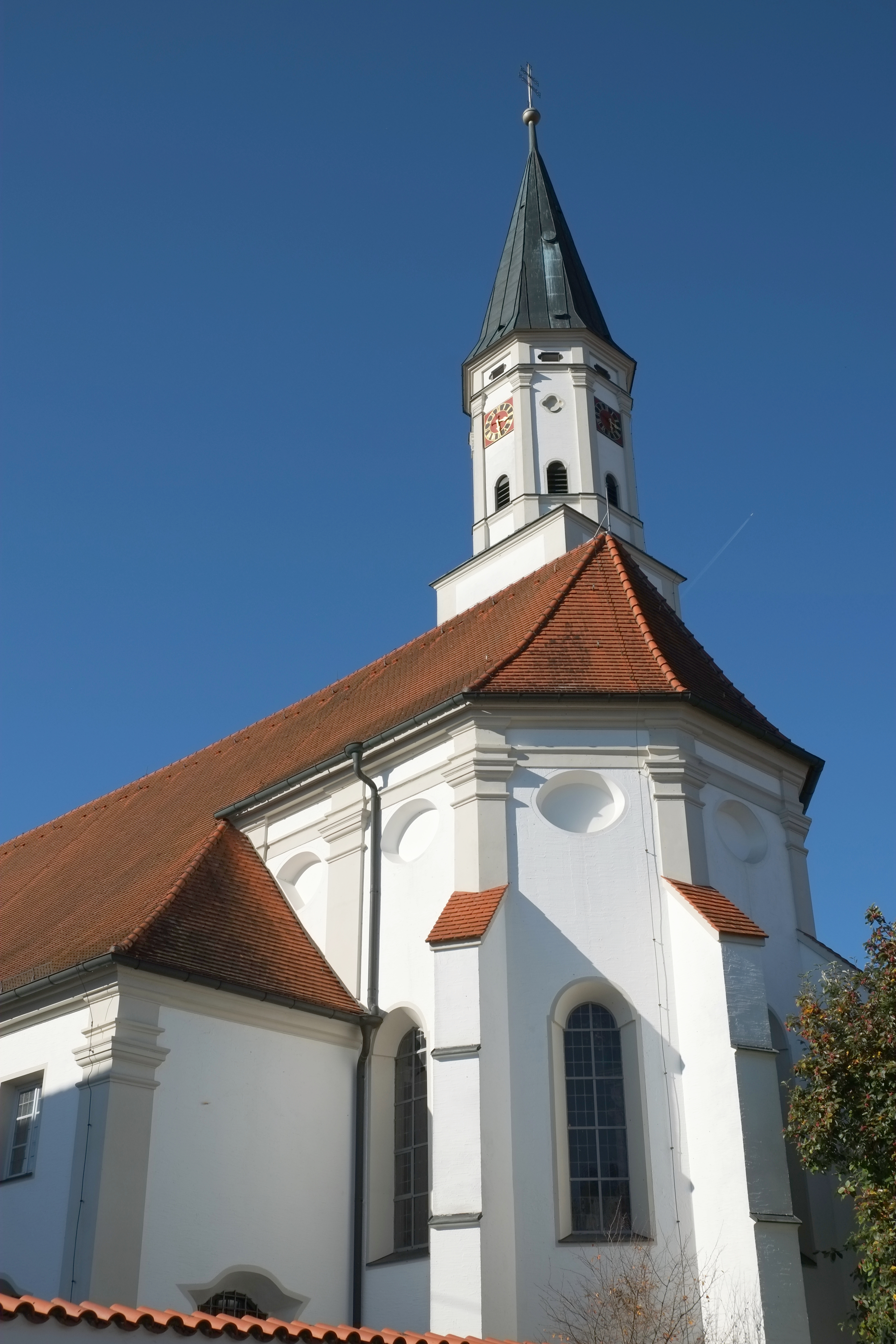 Katholische Pfarrkirche Kirche St. Martin in Blindheim im Landkreis Dillingen an der Donau (Bayern, Deutschland)